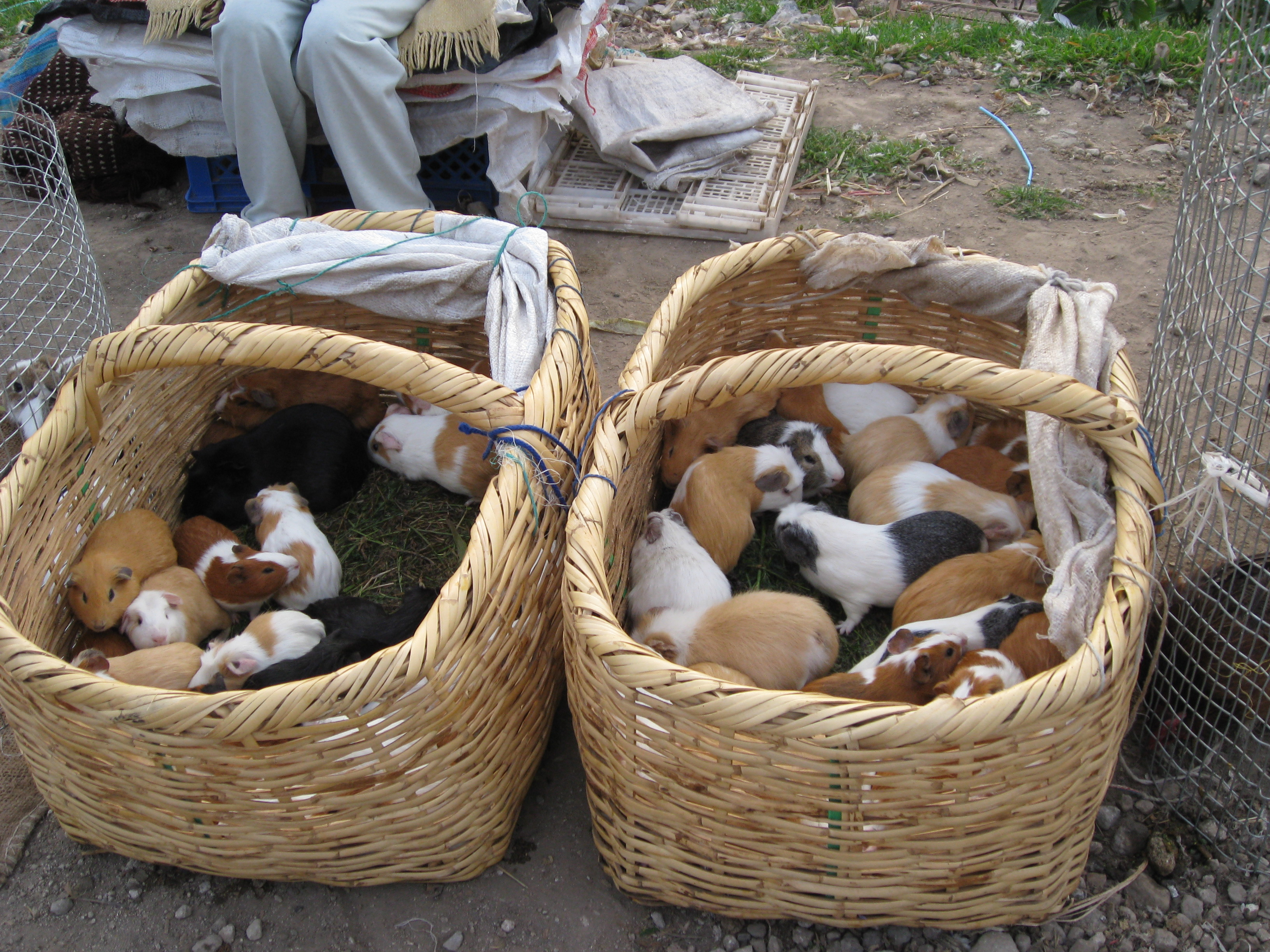 Guinea pigs for sale in an Ecuadorian market.